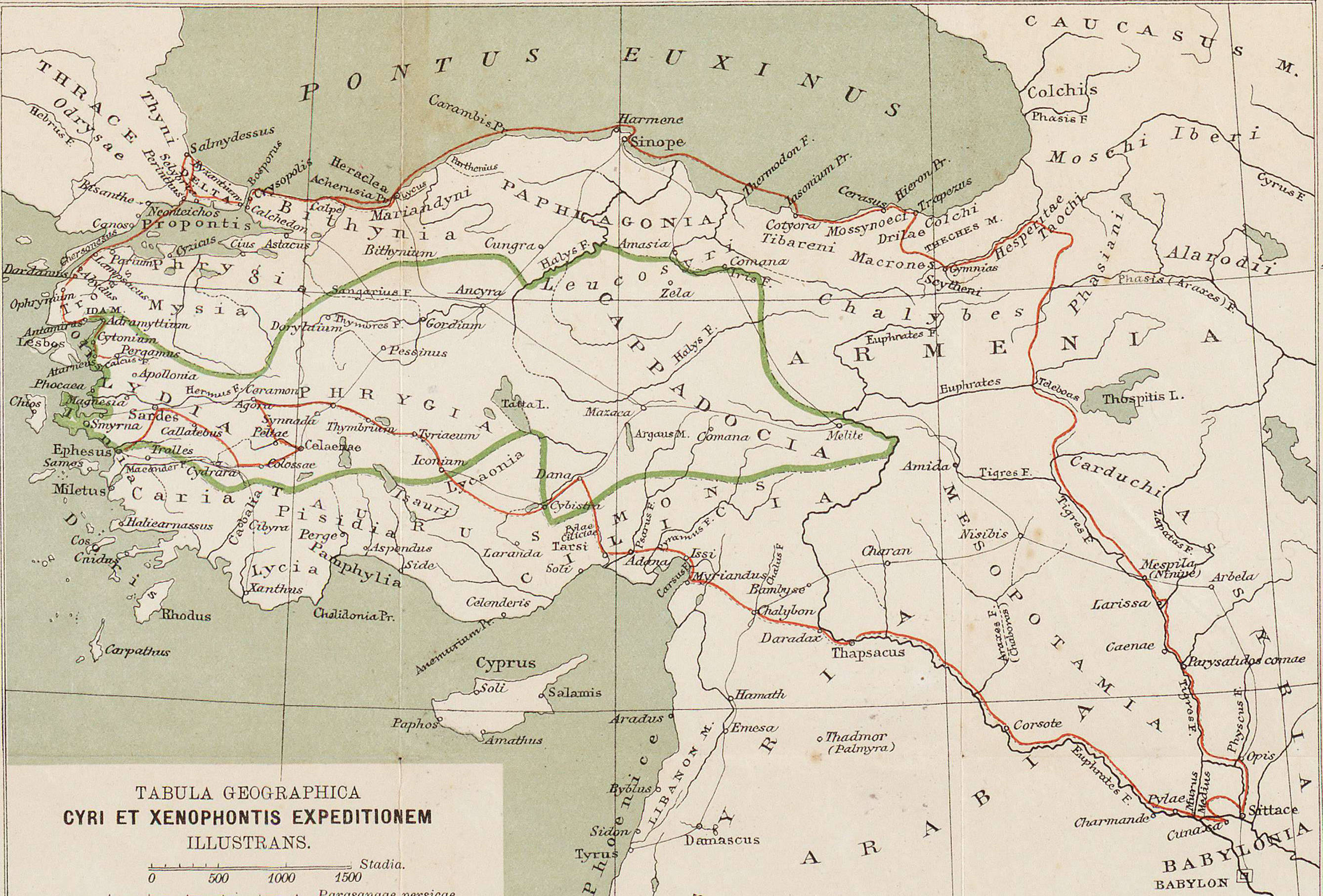 Tabula geographica Cyri et Xenophontis expeditionem illustrans Scale ca. 1:8.000.000 Publisher: Leiden : Brill 18 x 23 cm Historische kaart van de tocht van Xenophon en de "Tienduizend" door het Perzische Rijk (401 v.Chr.)